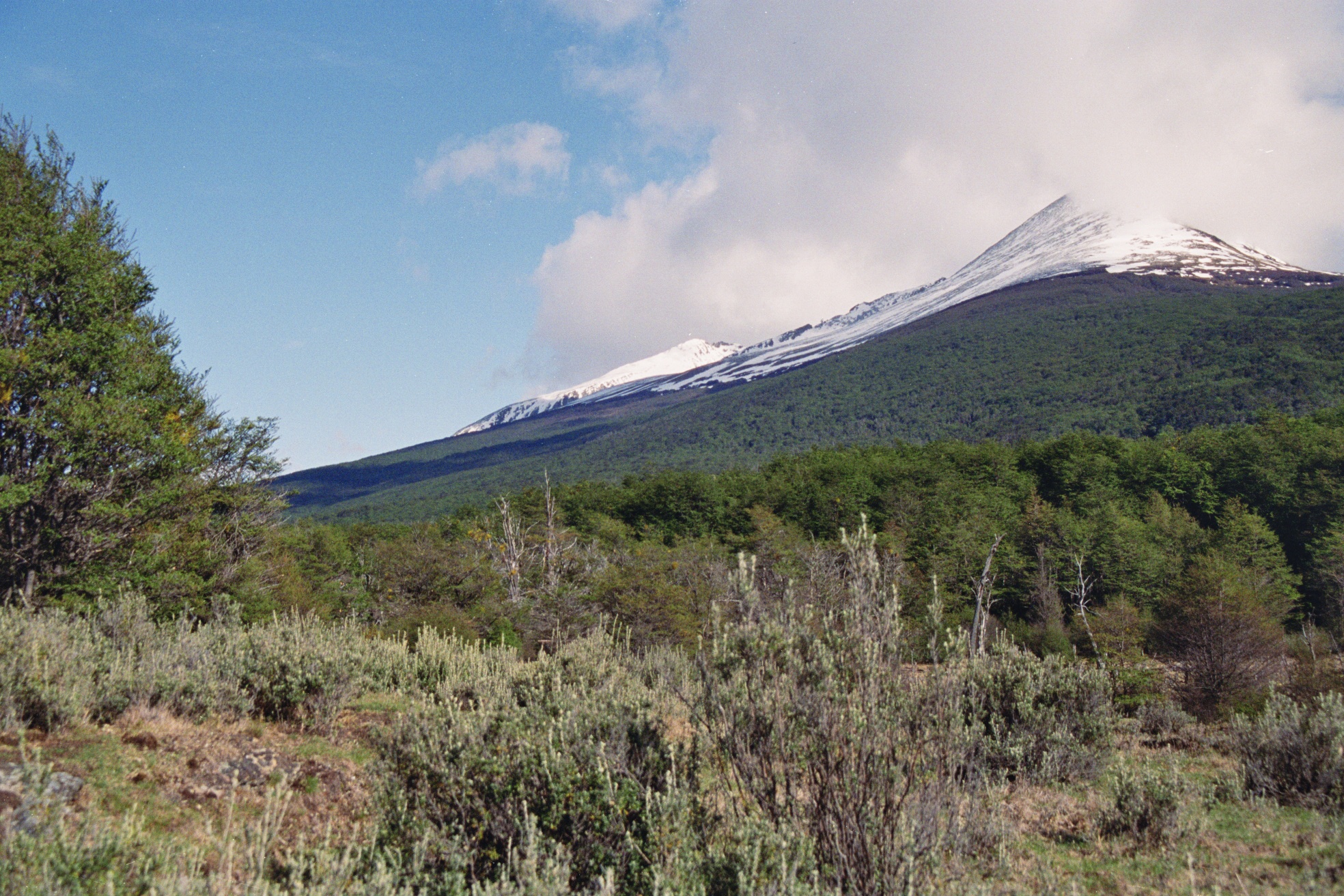 El Cerro Condor